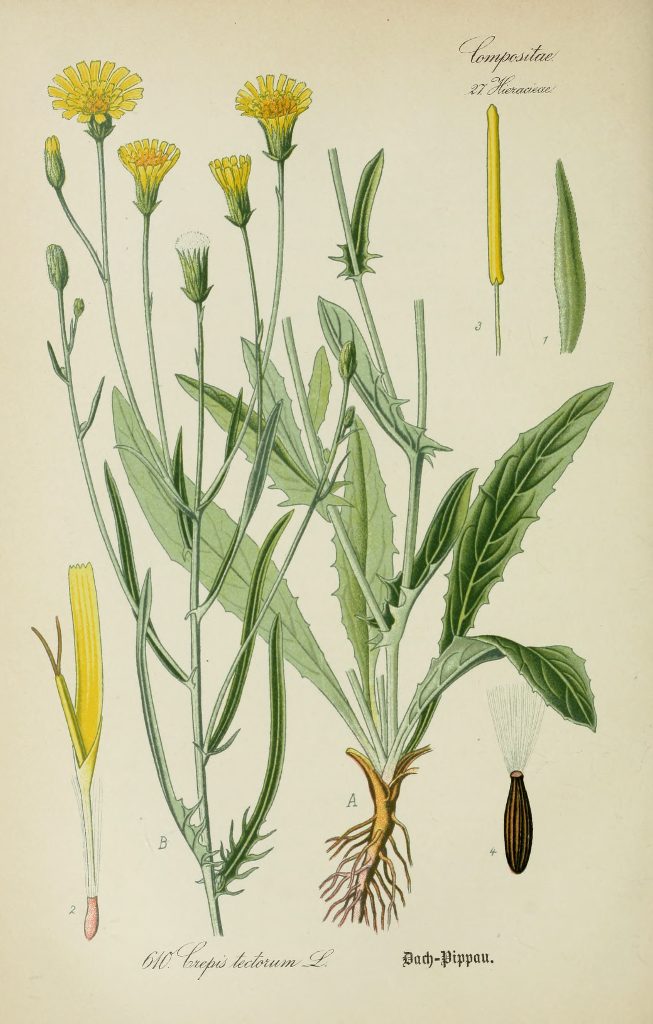 Legende: A Unteres Blatt. B Oberer Teil der Pflanze. 1 Innere Zungenblüte. 2 Frucht, Pappus entfernt. Frucht. (1, 2 vergr.).